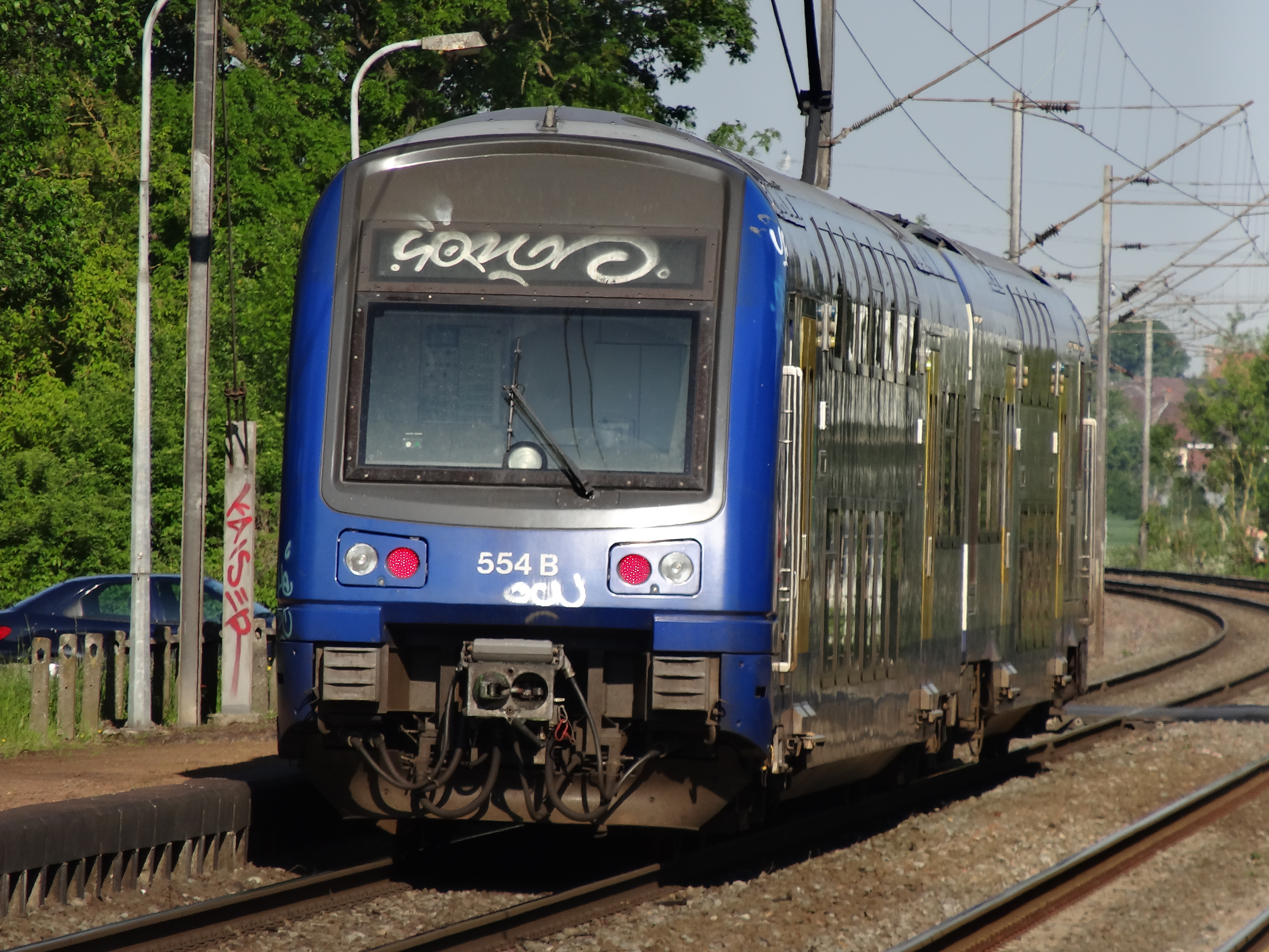 Gare de Beuvrages, Nord, Nord-Pas-de-Calais, France. Z 23500 du TER Nord-Pas-de-Calais.